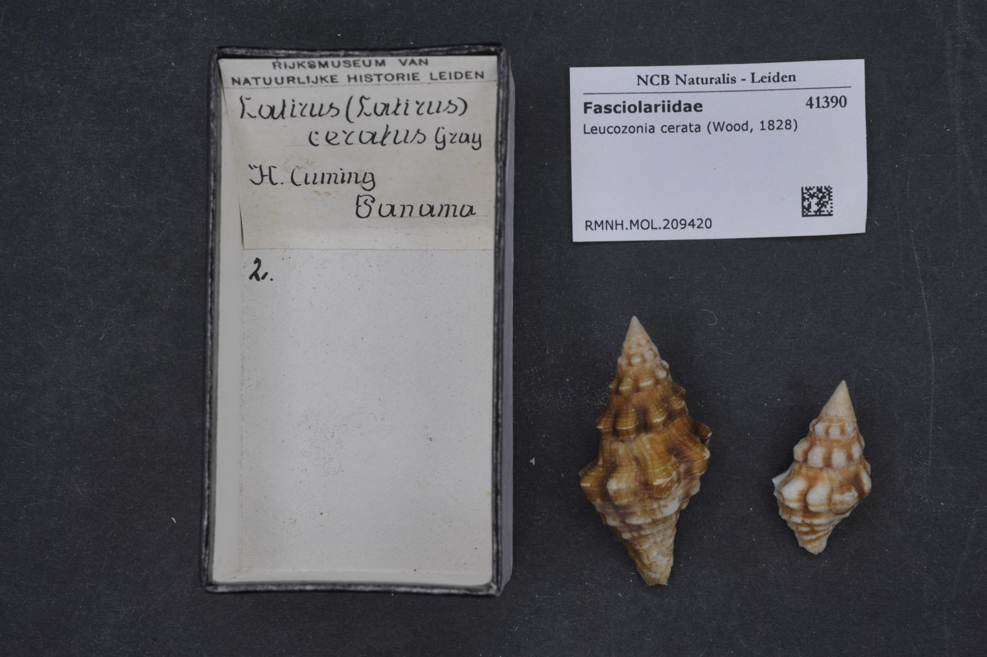 Leucozonia cerata (Wood, 1828)